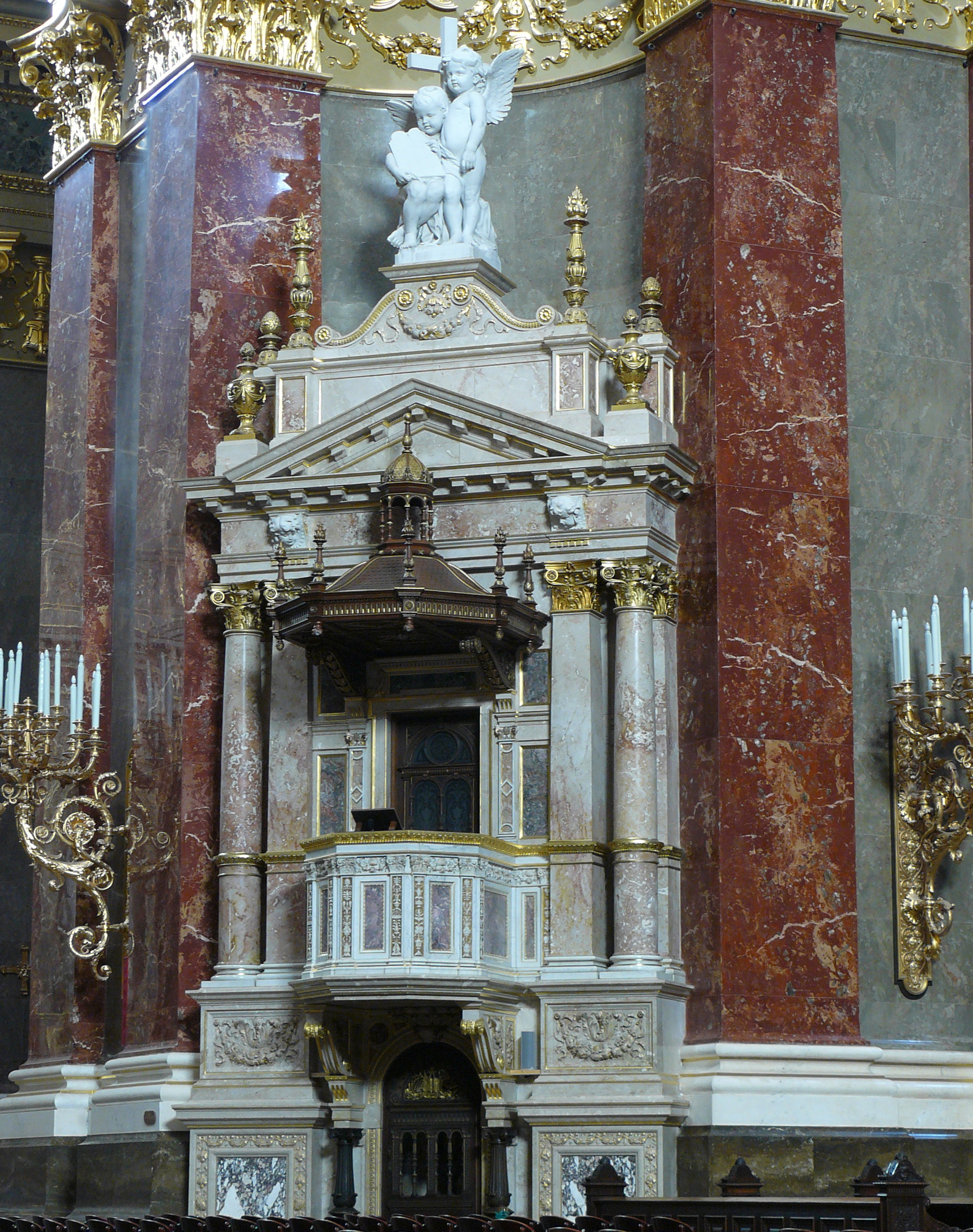 A Bazilika szószéke Kauser József munkája